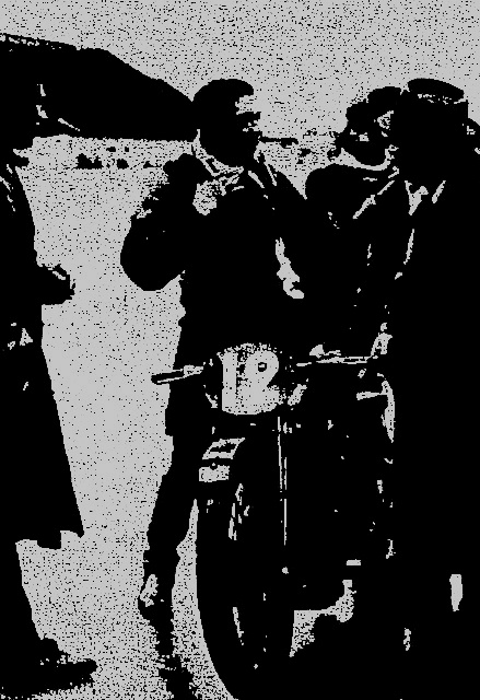 Georges Monneret, champion de France motocycliste pour le seconde fois, à à Montlhéry en 500cm3, en septembre 1934.